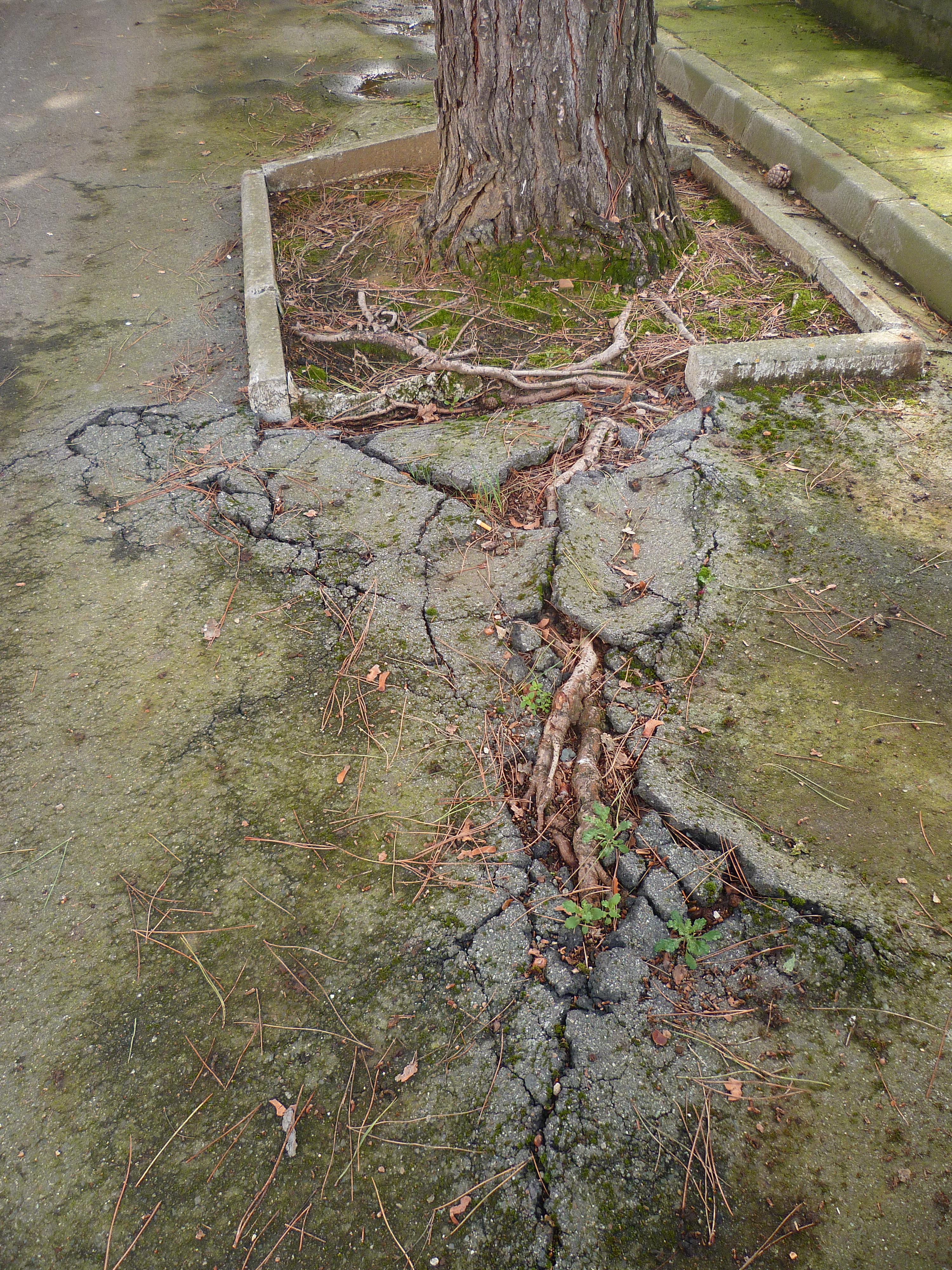 Toulouse (Haute-Garonne, France) : Un pin parasol à l'étroit au cimetière de Salonique.